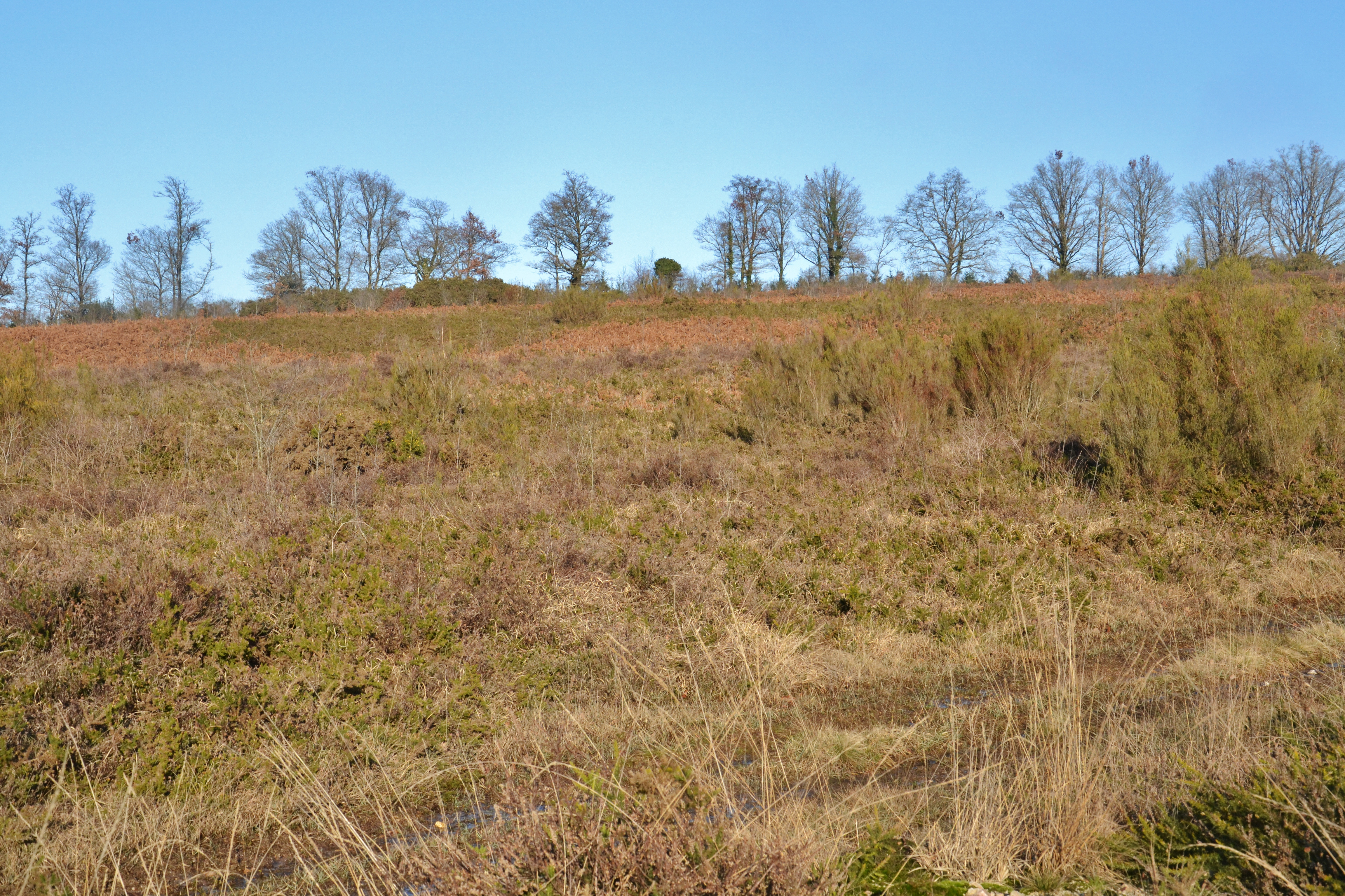 La lande sèche de Ceinturat, commune de Cieux (Haute-Vienne, France)